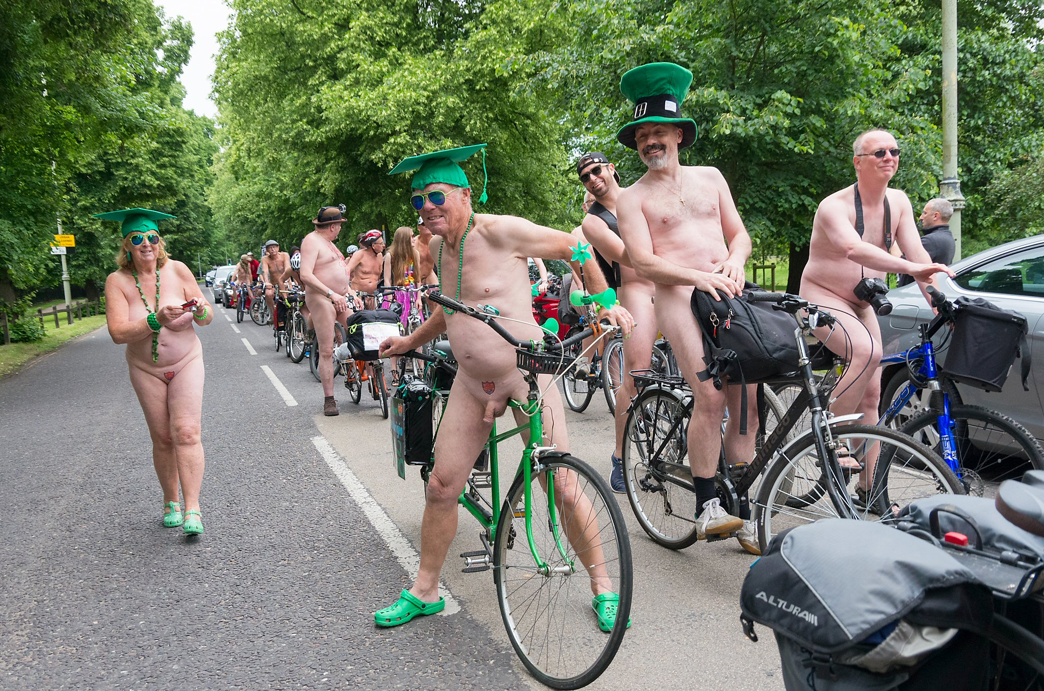 Cambridge WNBR 2016